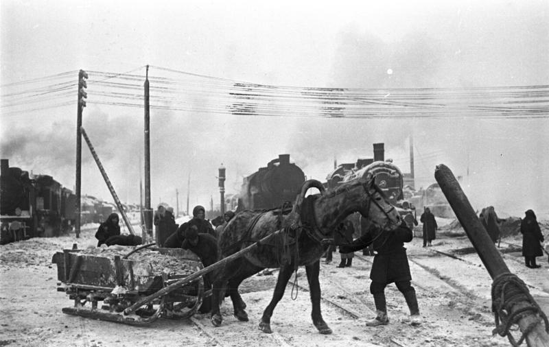 Russland, jüdische Zwangsarbeiter bei Schneebeseitigung ADN-ZB/Donath II. Weltkrieg 1939-1945 Judenverfolgung durch die deutschen faschistischenBesatzungstruppen in der Sowjetunion (Belarus, SSR) Jüdische Bürger von Orscha, die auf dem Bahnhofsgelände Zwangsarbeit leisten, werden für die Eis- und Schneebeseitigung eingesetzt Aufn. Februar 1942